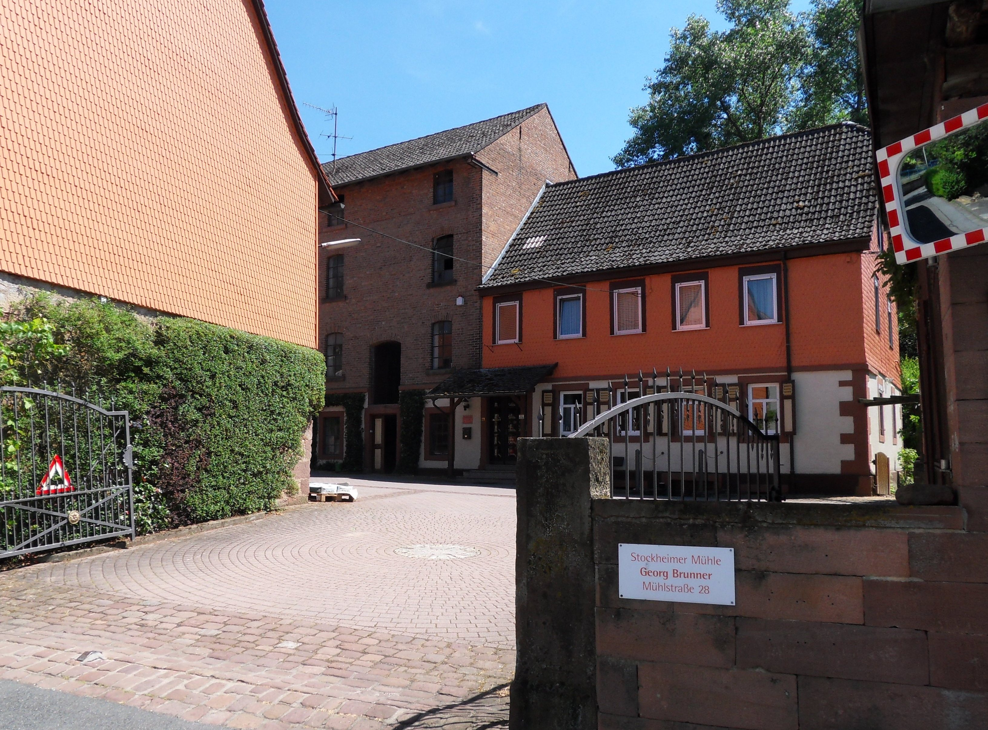 Denkmalgeschützte Stockheimer Mühle im Odenwald mit Toreinfahrt